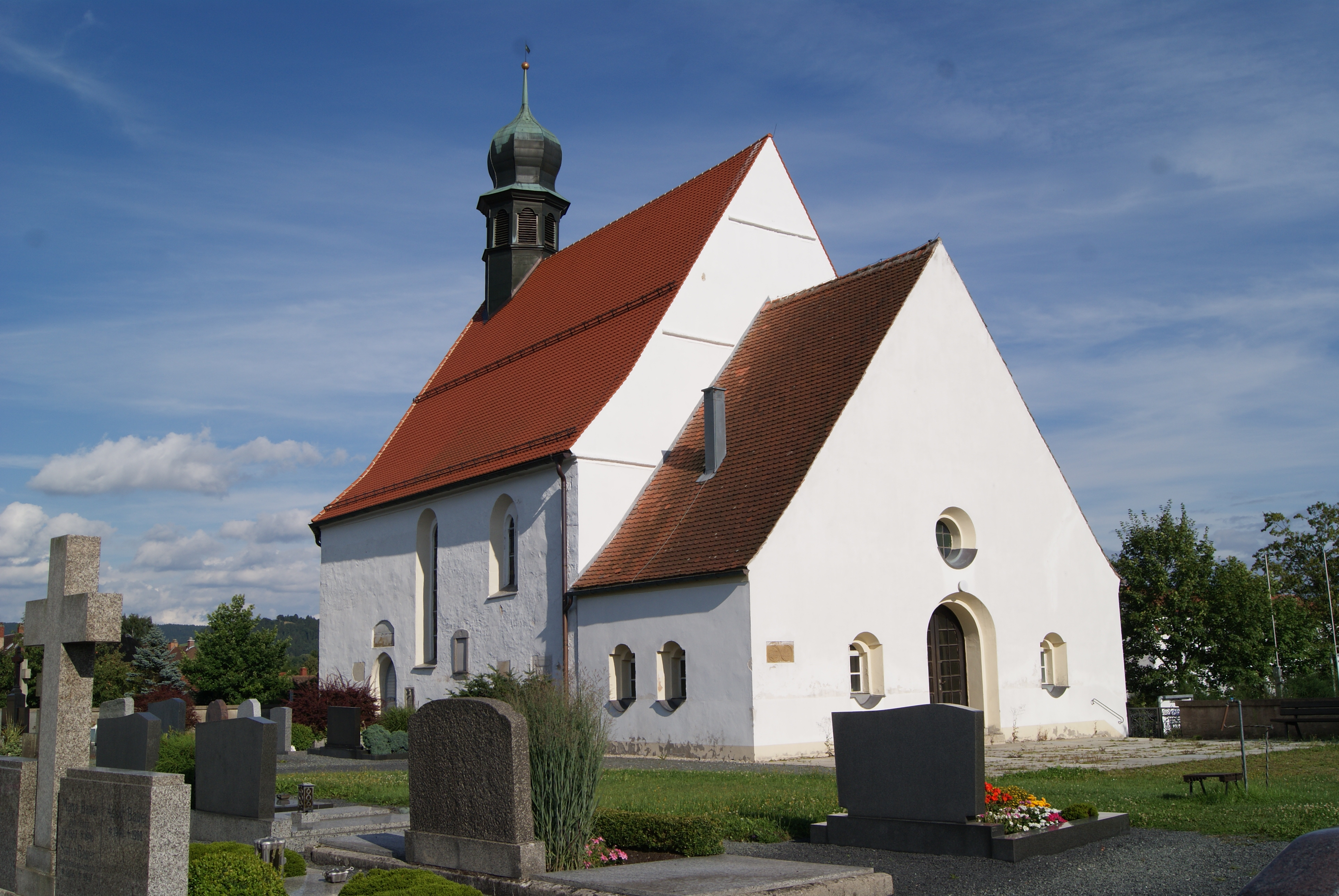 Kemnath, Bayreuther Straße 20. Katholische Friedhofskirche Sankt Maria Magdalena. Nachgotischer Saalbau, verputzter Massivbau mit Satteldach und unregelmäßigem, dreiseitigem Chorschluss, östlichem Zwiebeldachreiter und Rundbogenfenstern mit Maßwerk, von Gabriel Vischer und Sewolt Seitzen, bezeichnet „1604/1606“, westlich angebaute Leichenhalle jüngerThis is a photograph of an architectural monument.